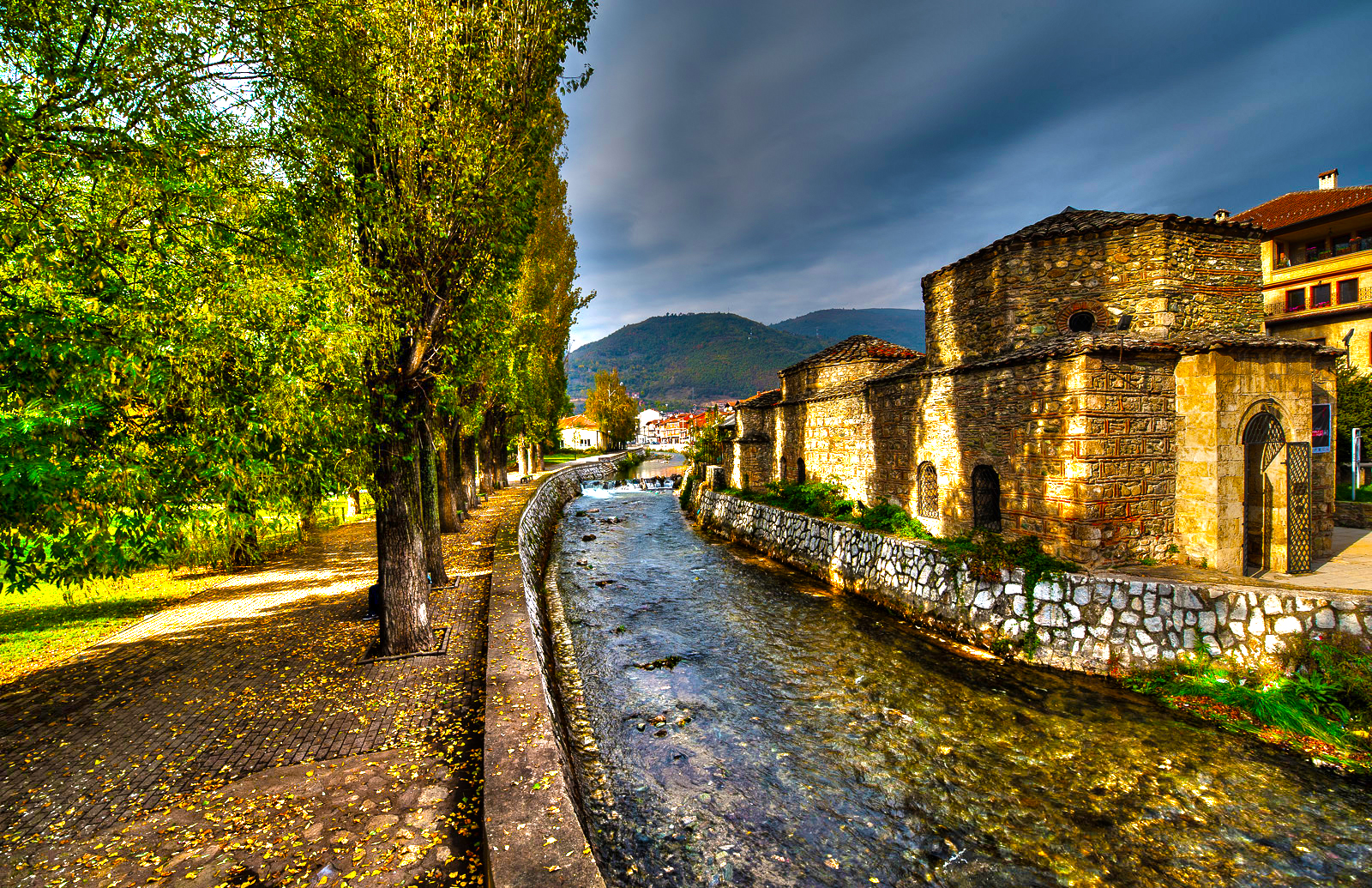 Амамаот на река Пена